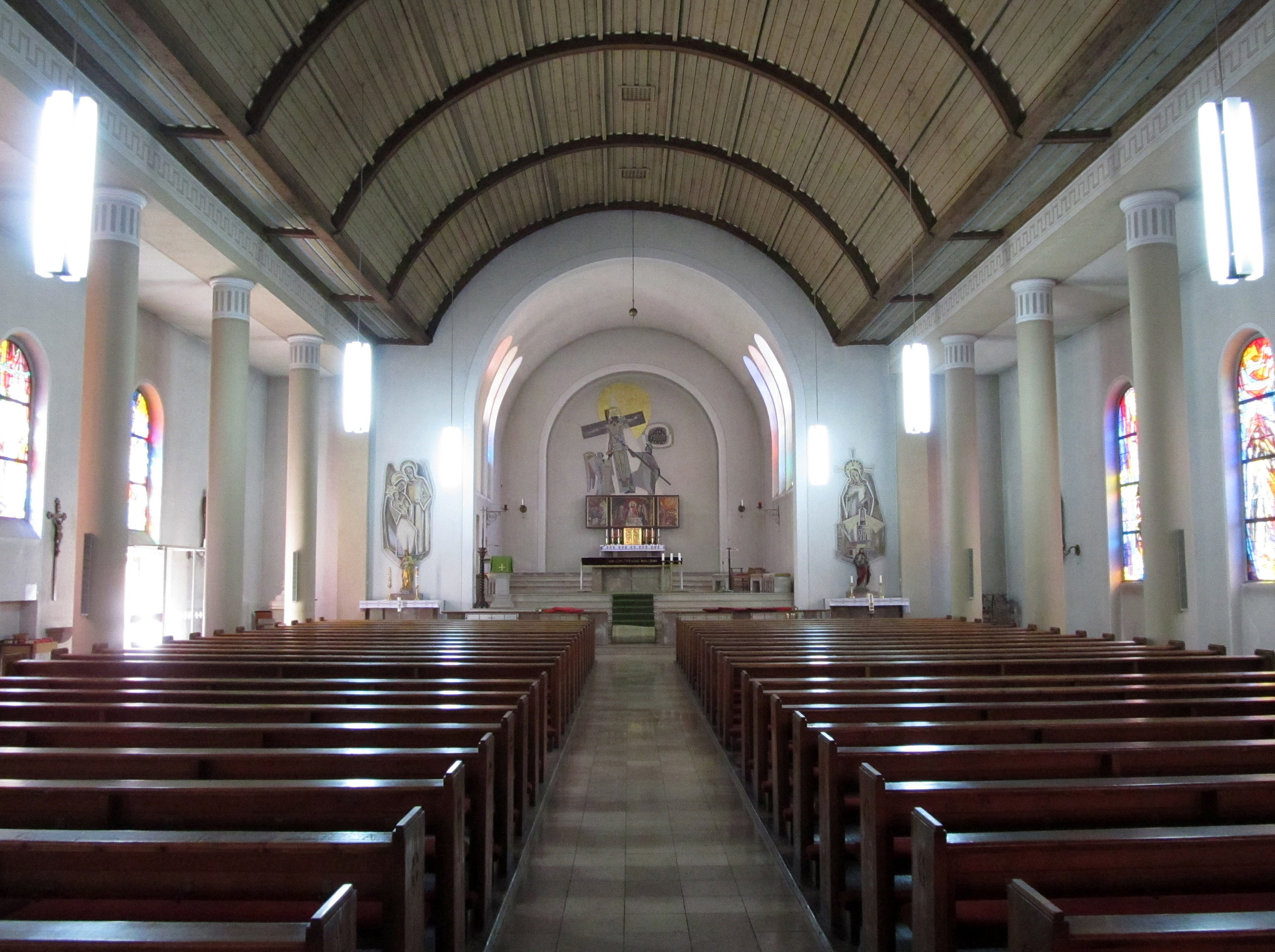 Blick ins Innere der katholischen Pfarrkirche Herz Jesu in Oberwürzbach, Saarland